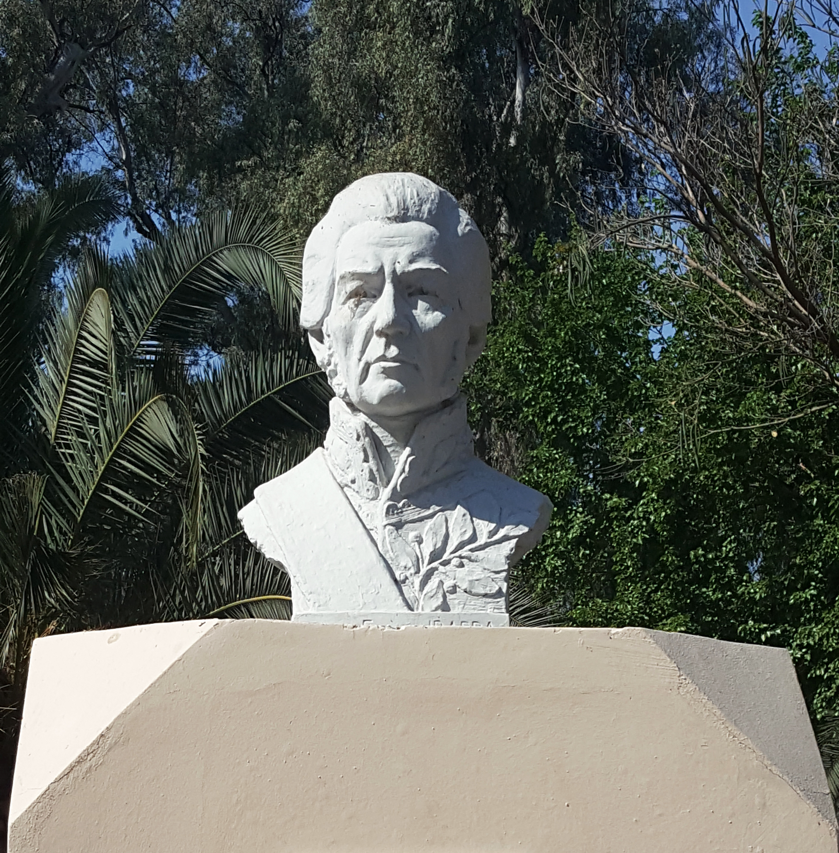 Busto del Coronel Juan Felipe Ibarra (1787-1851), artífice de la autonomía de la provincia argentina de Santiago del Estero.